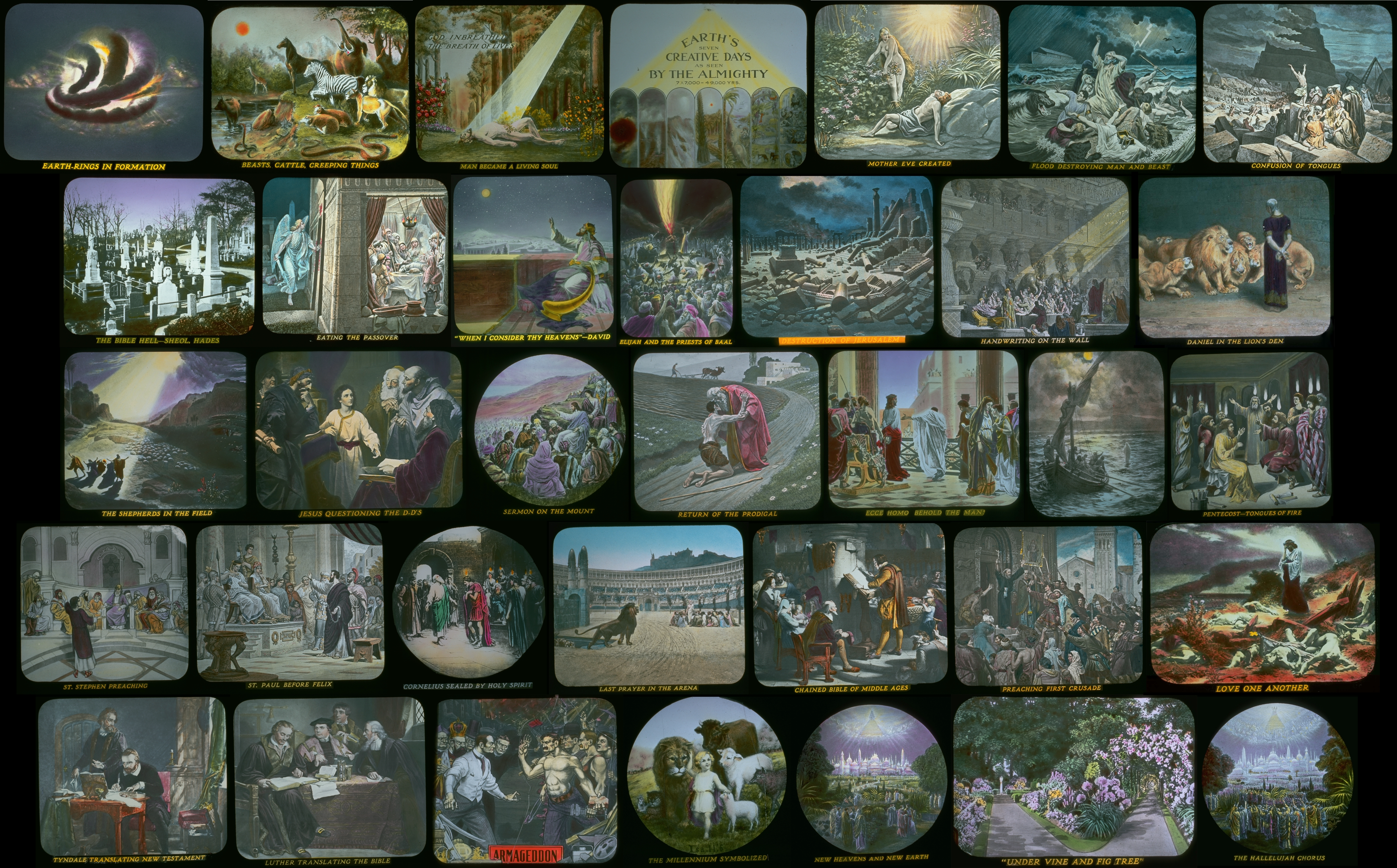 Σλάιντς του Φωτοδράματος της Δημιουργίας